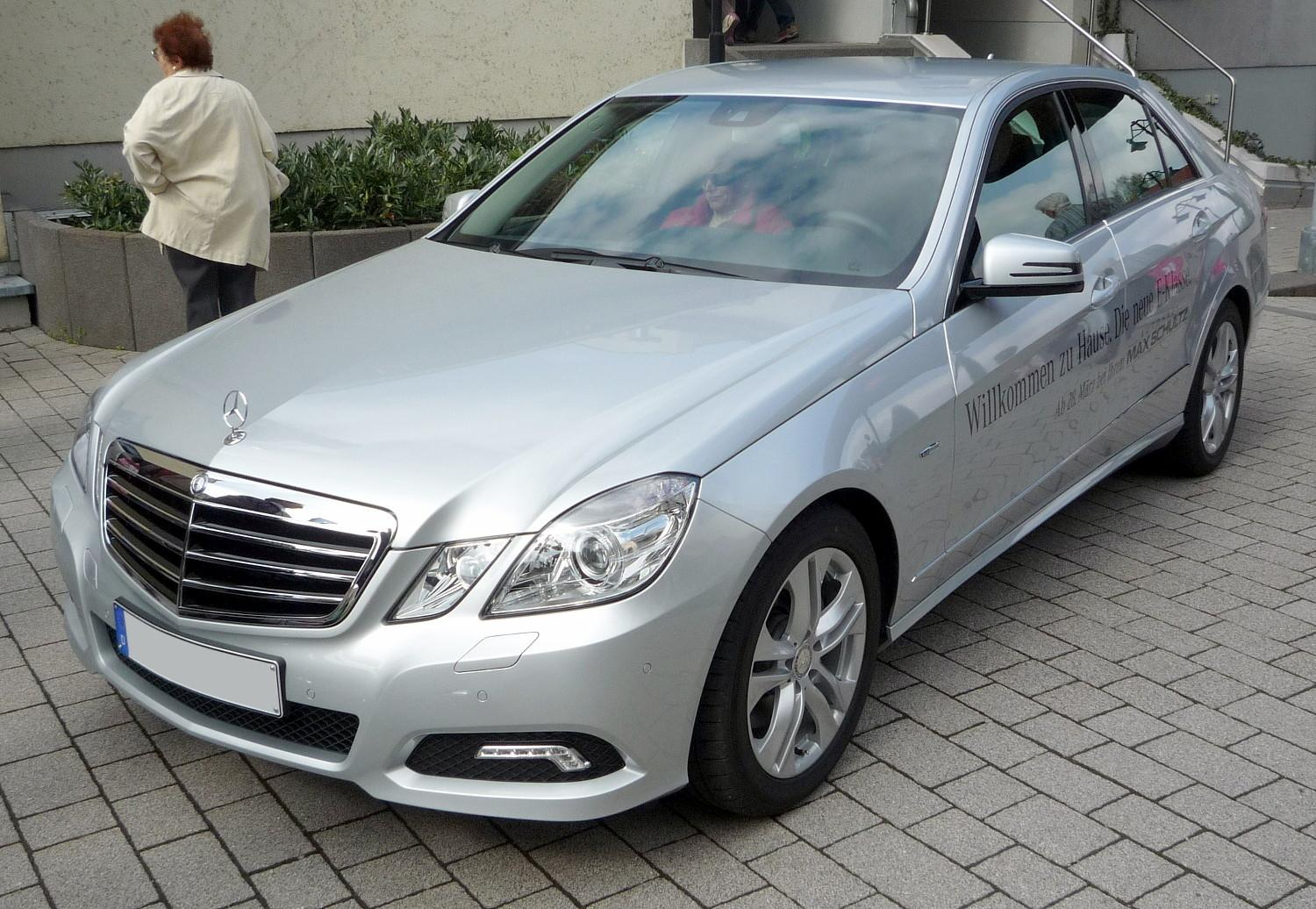 Mercedes-Benz W212 250 CDI